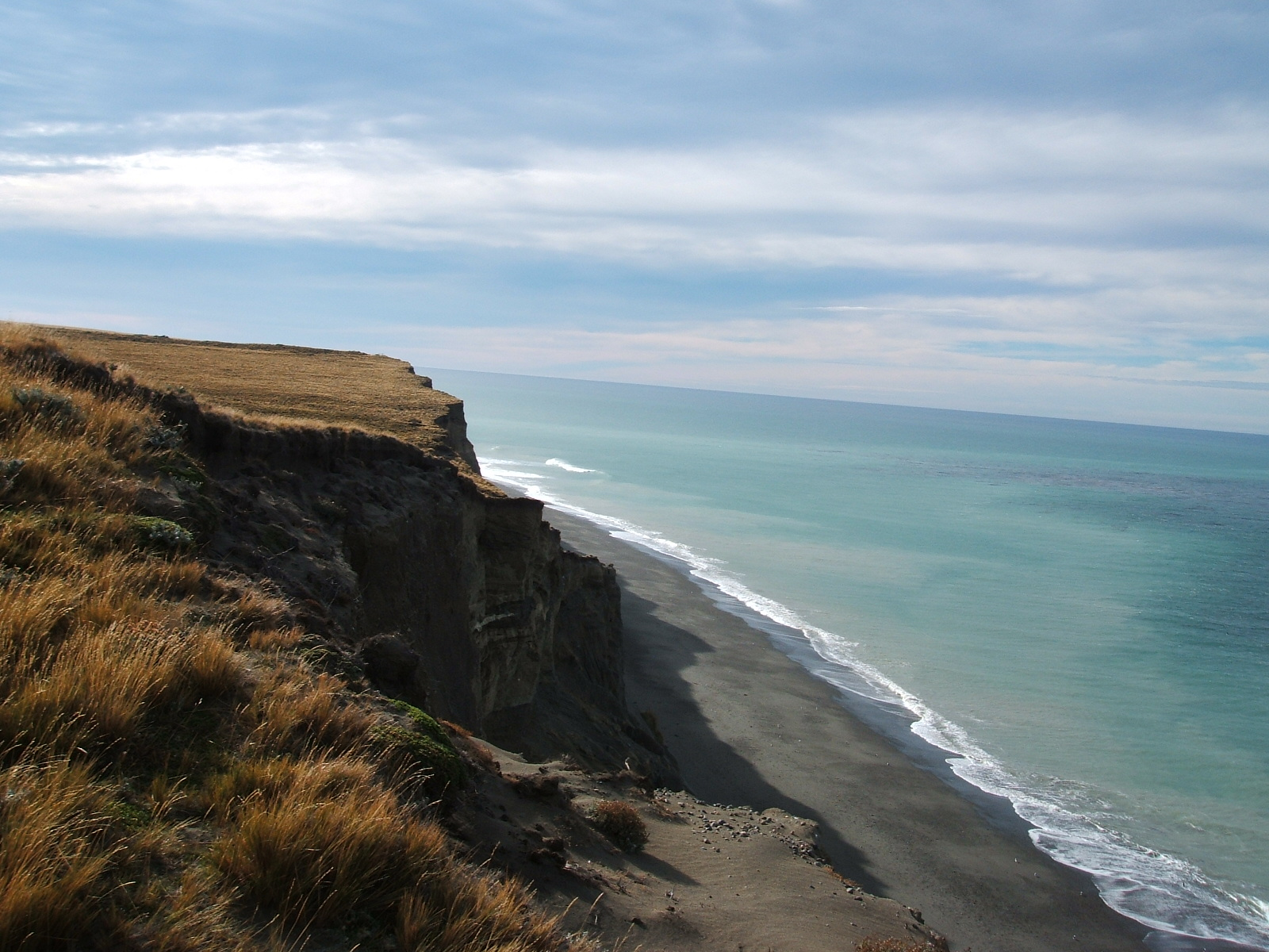 Acantilado próximo a Cabo Vírgenes, Santa Cruz, Argentina